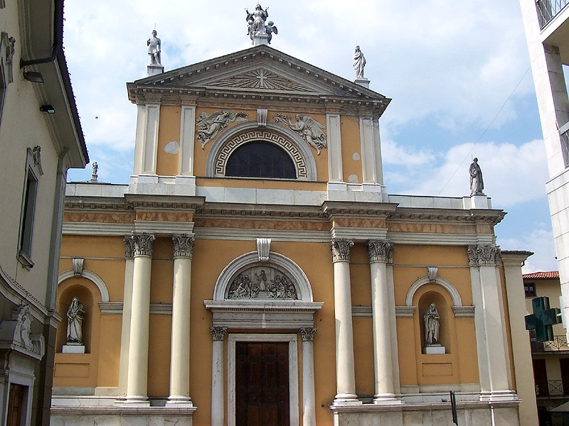 Palazzolo sull'Oglio - Chiesa Parrocchiale dell'Assunta